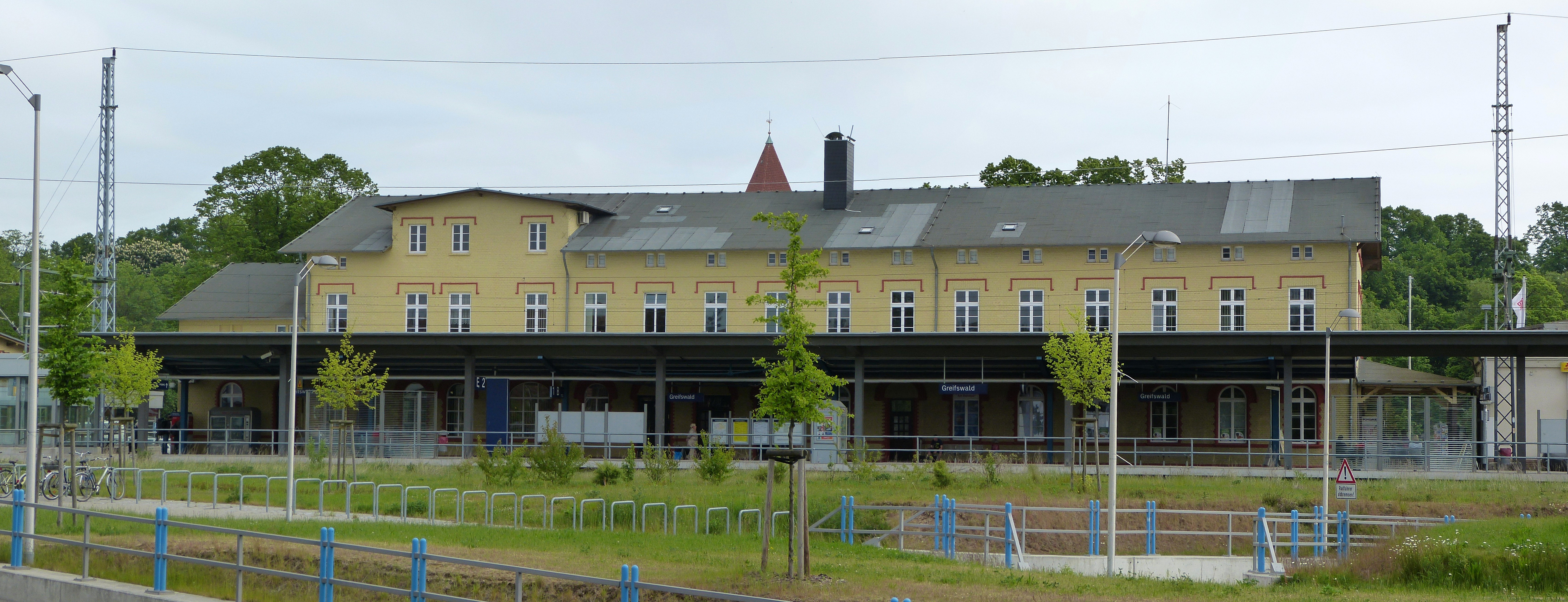 Bahnhof Greifswald, Südwestseite, Gleisseite